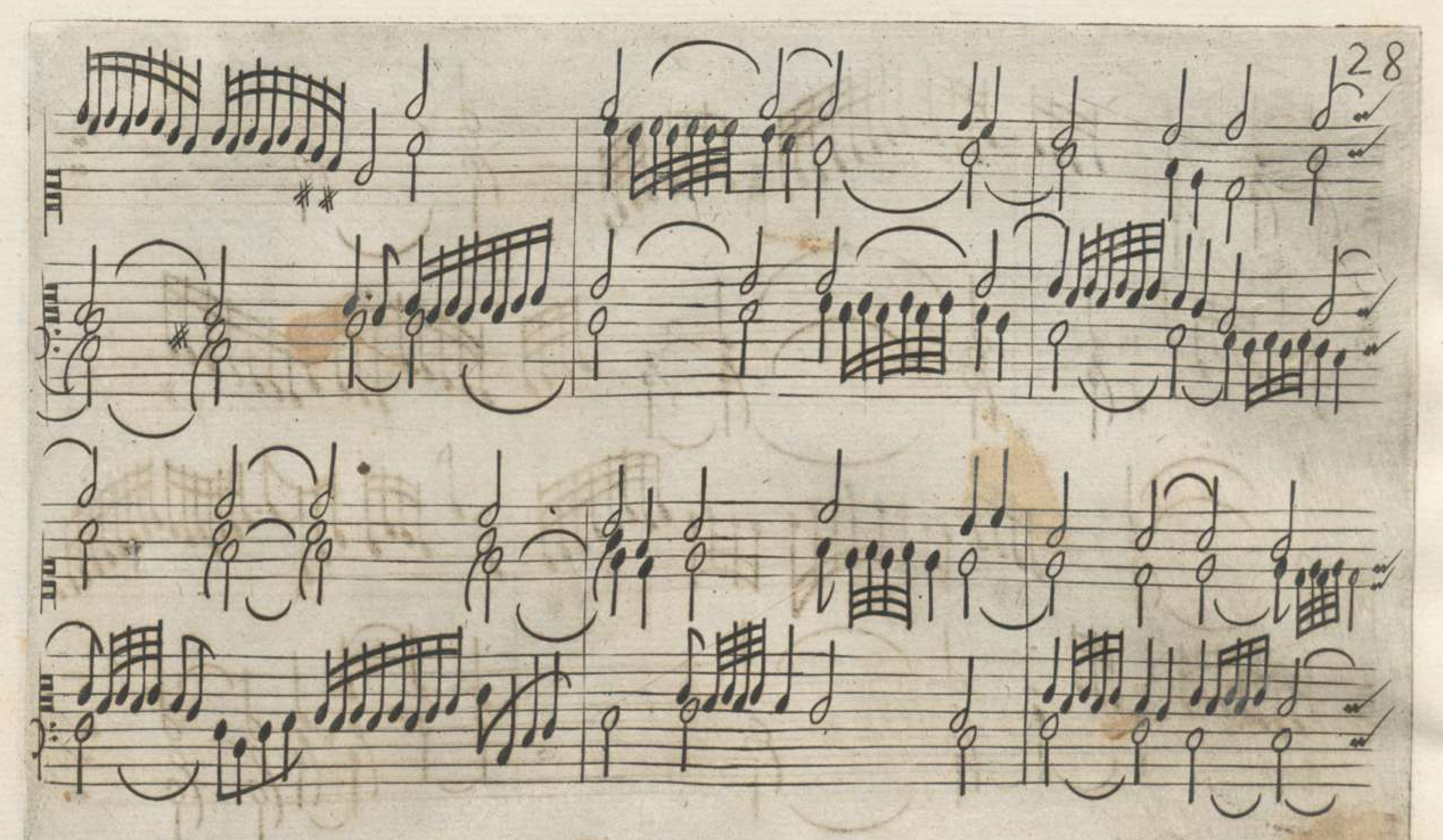 Claudio Merulo, Toccata 7 (detail), Libro 1 , Roma 1598